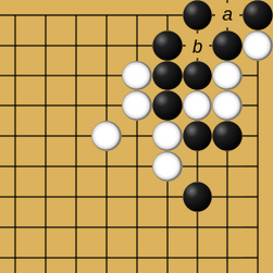 Première étape du ko à étages au jeu de go